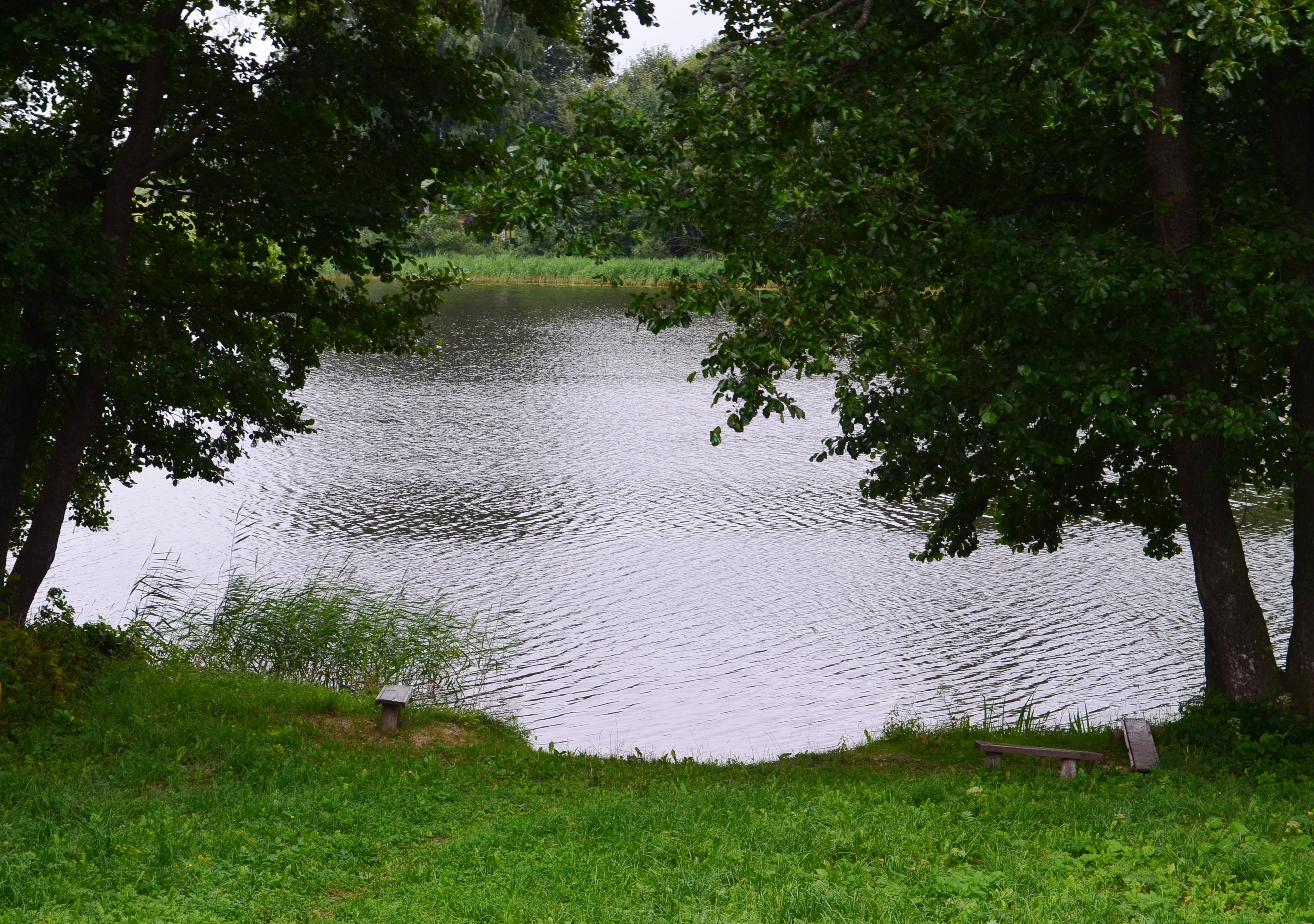 Ežeras Jūžintas šalia Jūžintų, Rokiškio r.